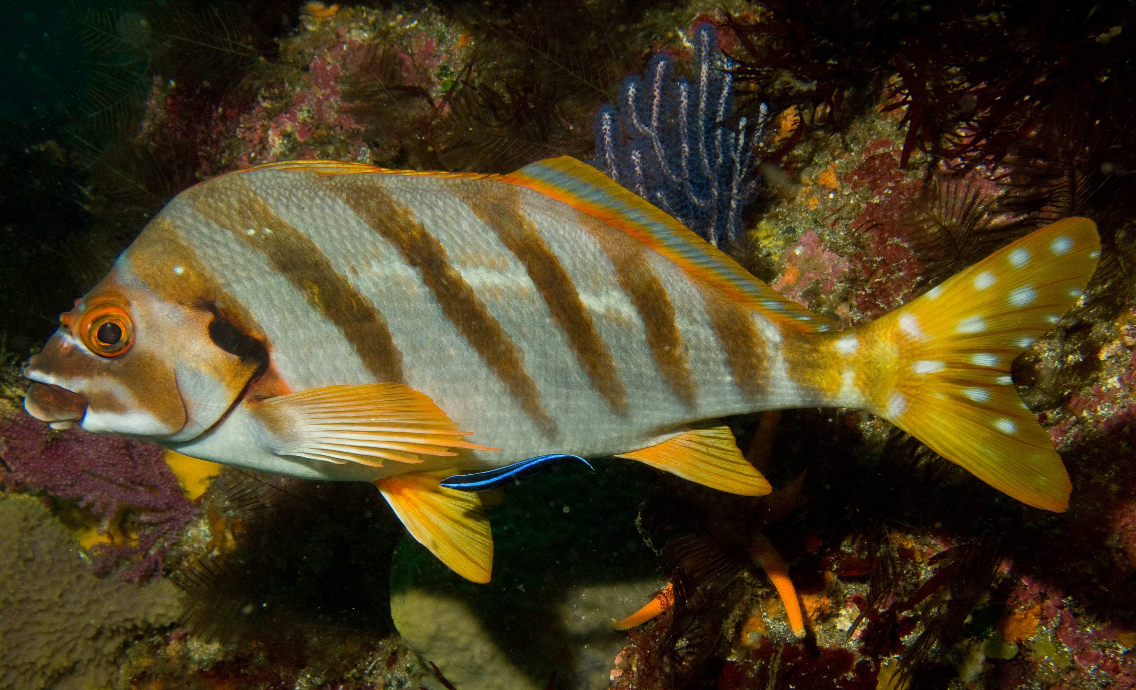 Cheilodactylus zonatus (Goniistius zonatus), Spottedtail morwong, タカノハダイ